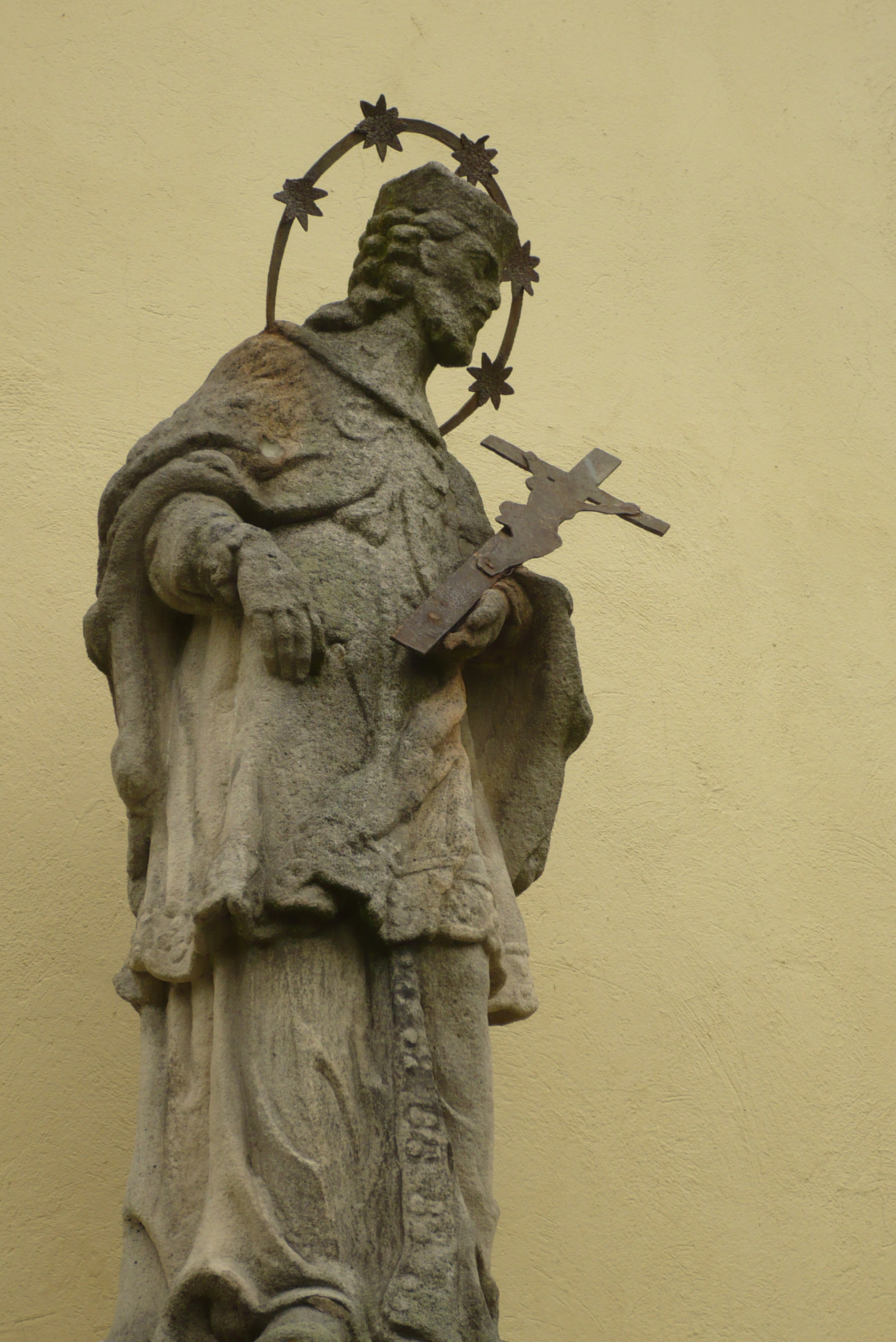 Lutynia - pierwotnie kościół pw. św. Barbary, od 1964 rzymskokatolicki kościół filialny pw. św. Jana Nepomucena, 1784